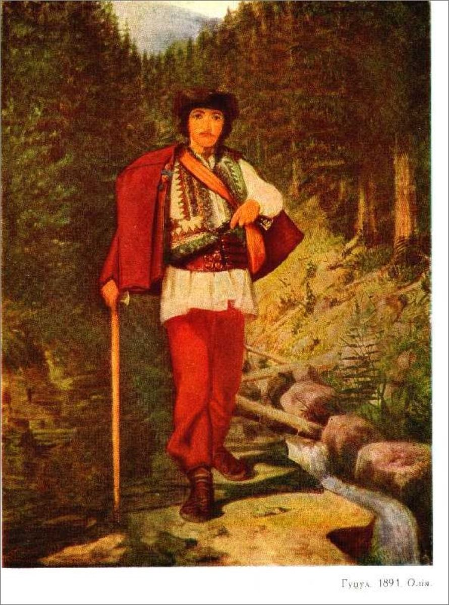 Hutsullabel QS:Len,"Hutsul" label QS:Luk,"Гуцул"